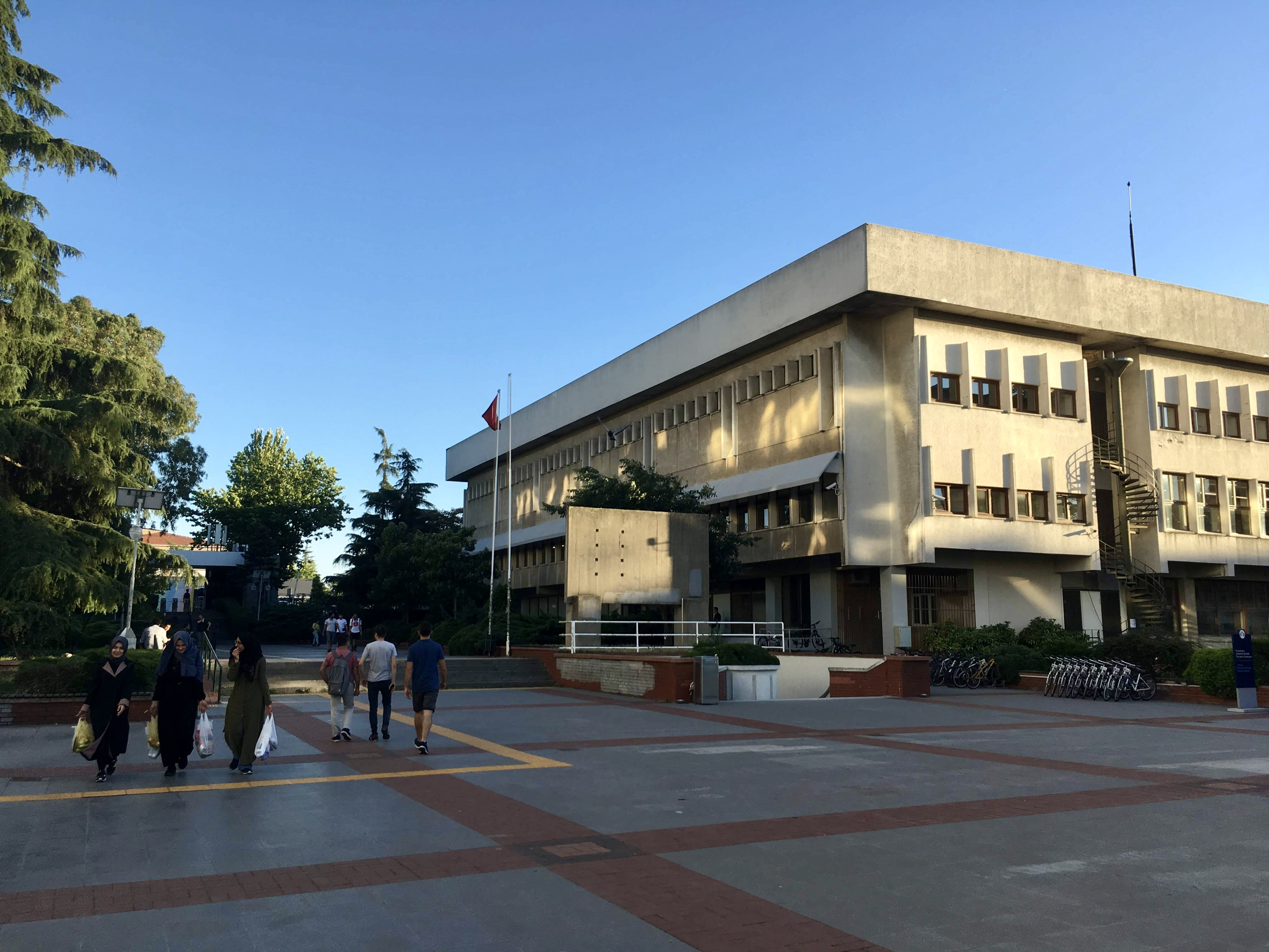 Boğaziçi Üniversitesi Kuzey Kampüsün içinde Aptullah Kuran Kütüphanesine doğru bir bakış